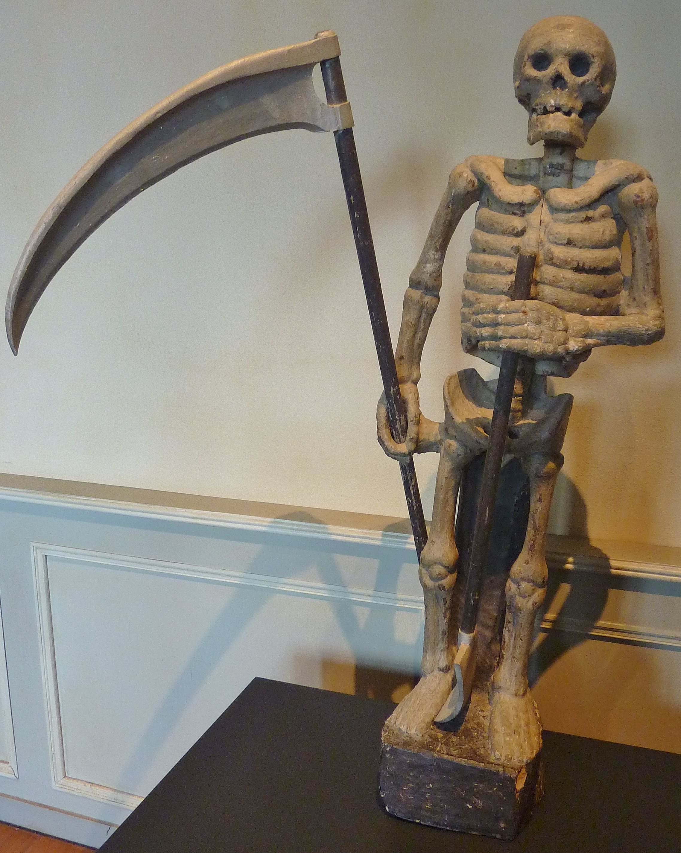 Ploumilliau : l'Ankou (statue en bois polychrome, 1630). L'Ankou personnifie la mort en Bretagne bretonnante. Lors des enterrements, cette statue, ainsi qu'une autre semblable, ornait le catafalque.